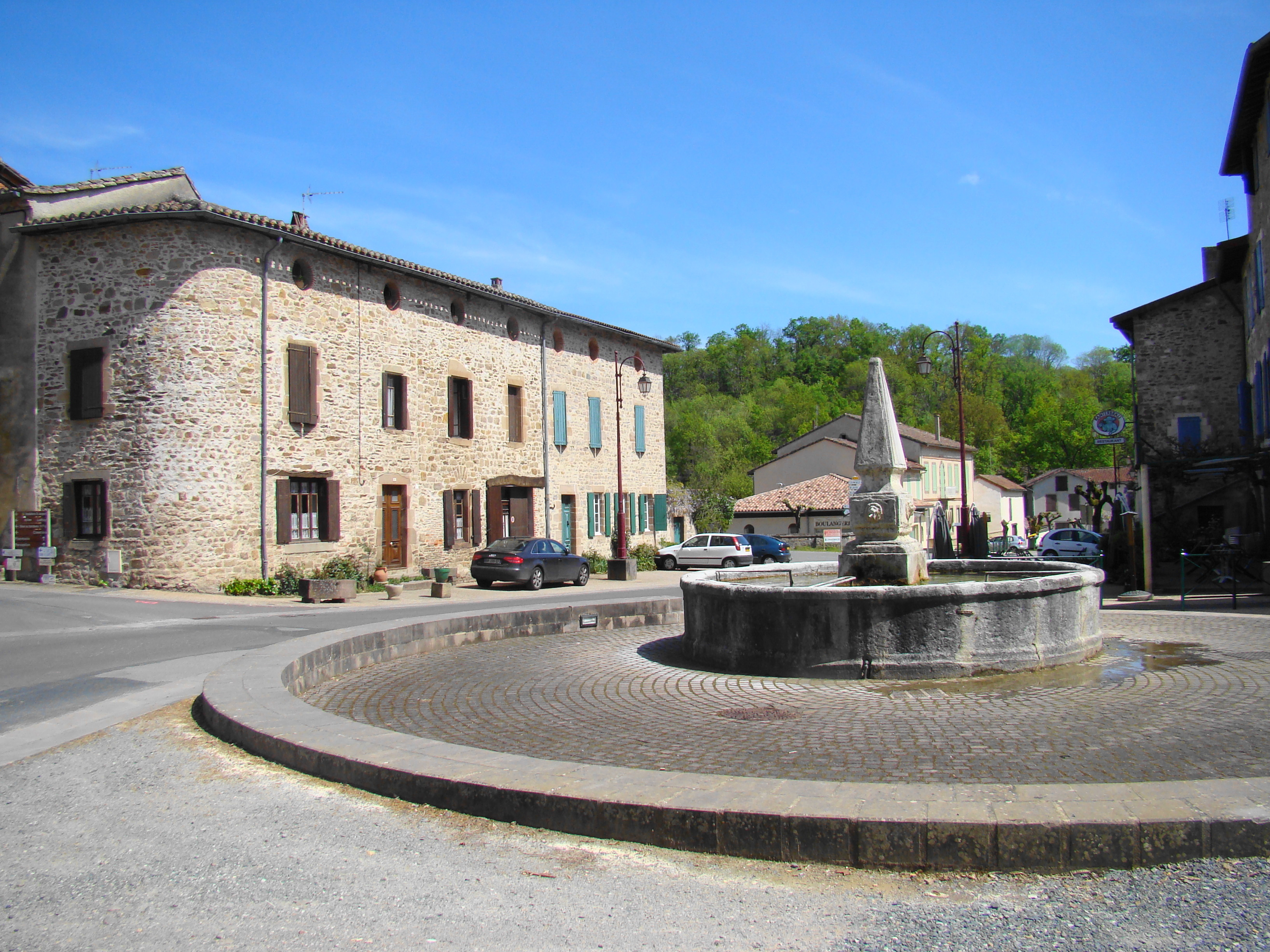 Fontaine "Le Griffoul"